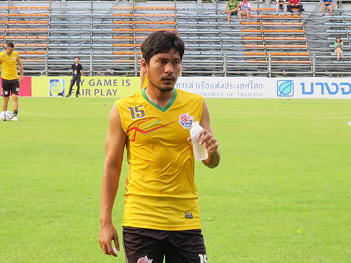 Seeket Madputeh